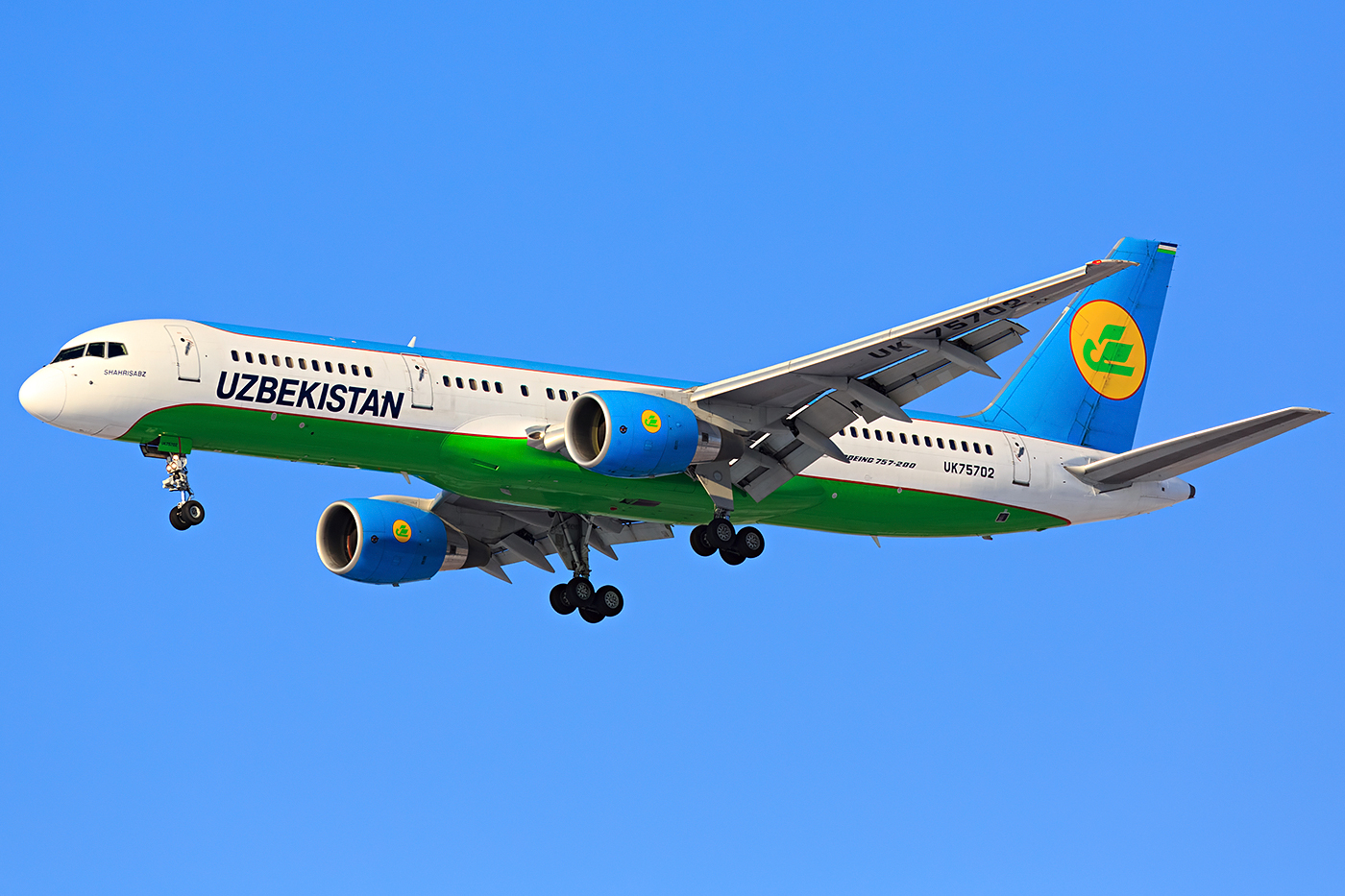 Boeing 757-200 of Uzbekistan Airways at Vladivostok Airport